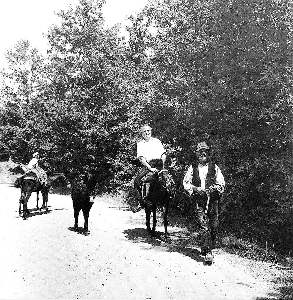 Inchiesta antropologica in Lucania di Ernesto de Martino (1956). L'asino condotto da Antonio Lo Sasso trasportava le attrezzature di registrazione magnetofonica nei luoghi dove la RAI non poteva giungere